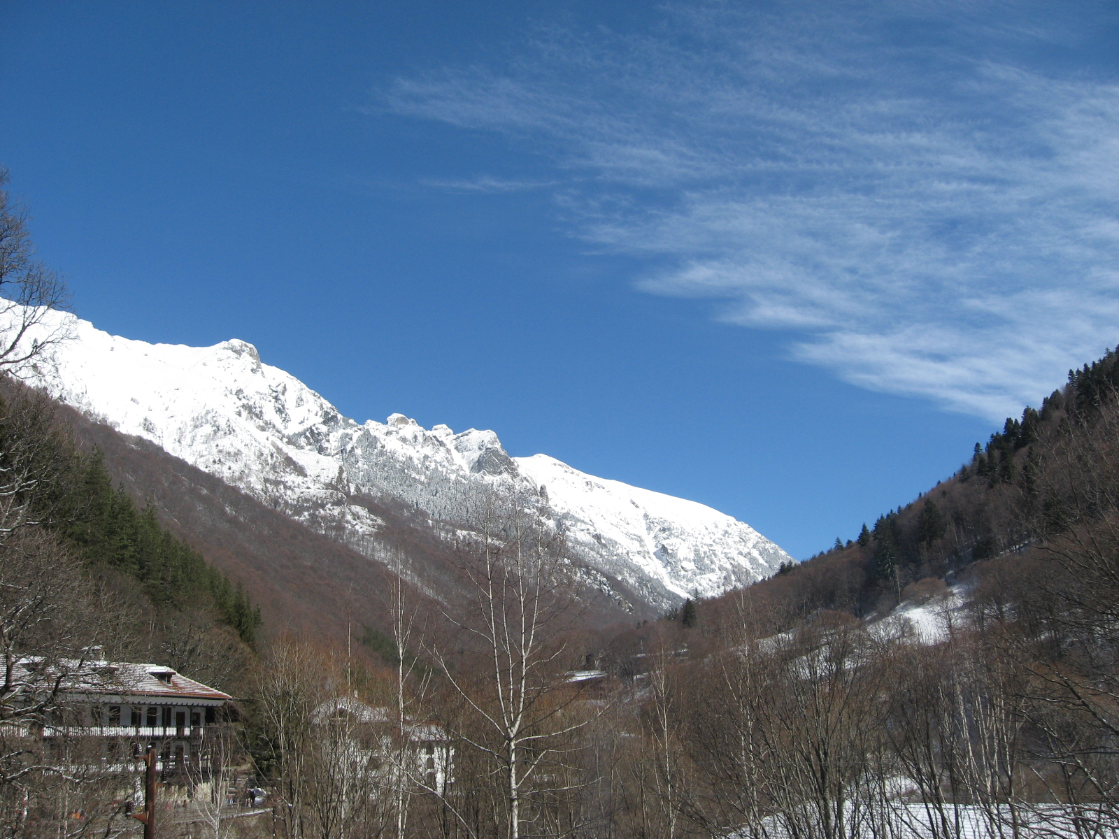 Рила Сопствена слика Драган Цветковић Ниш